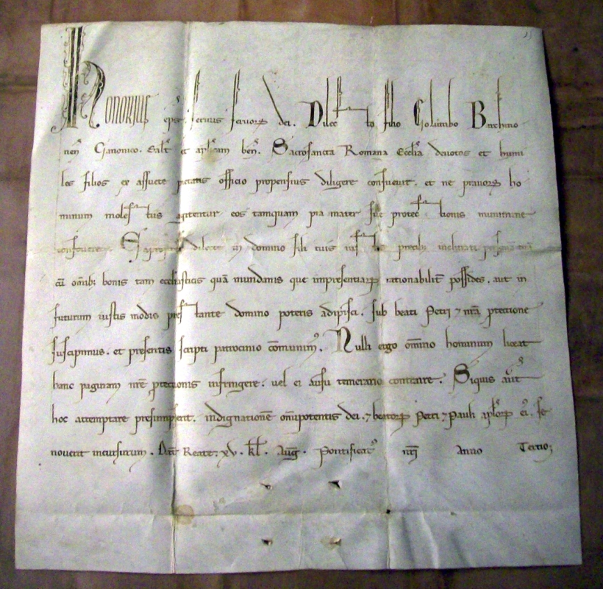 Salvaguarda del Papa Honori III de protecció a l’Hospital del Canonge Colom, un dels predecessors de l’Hospital de la Santa Creu.